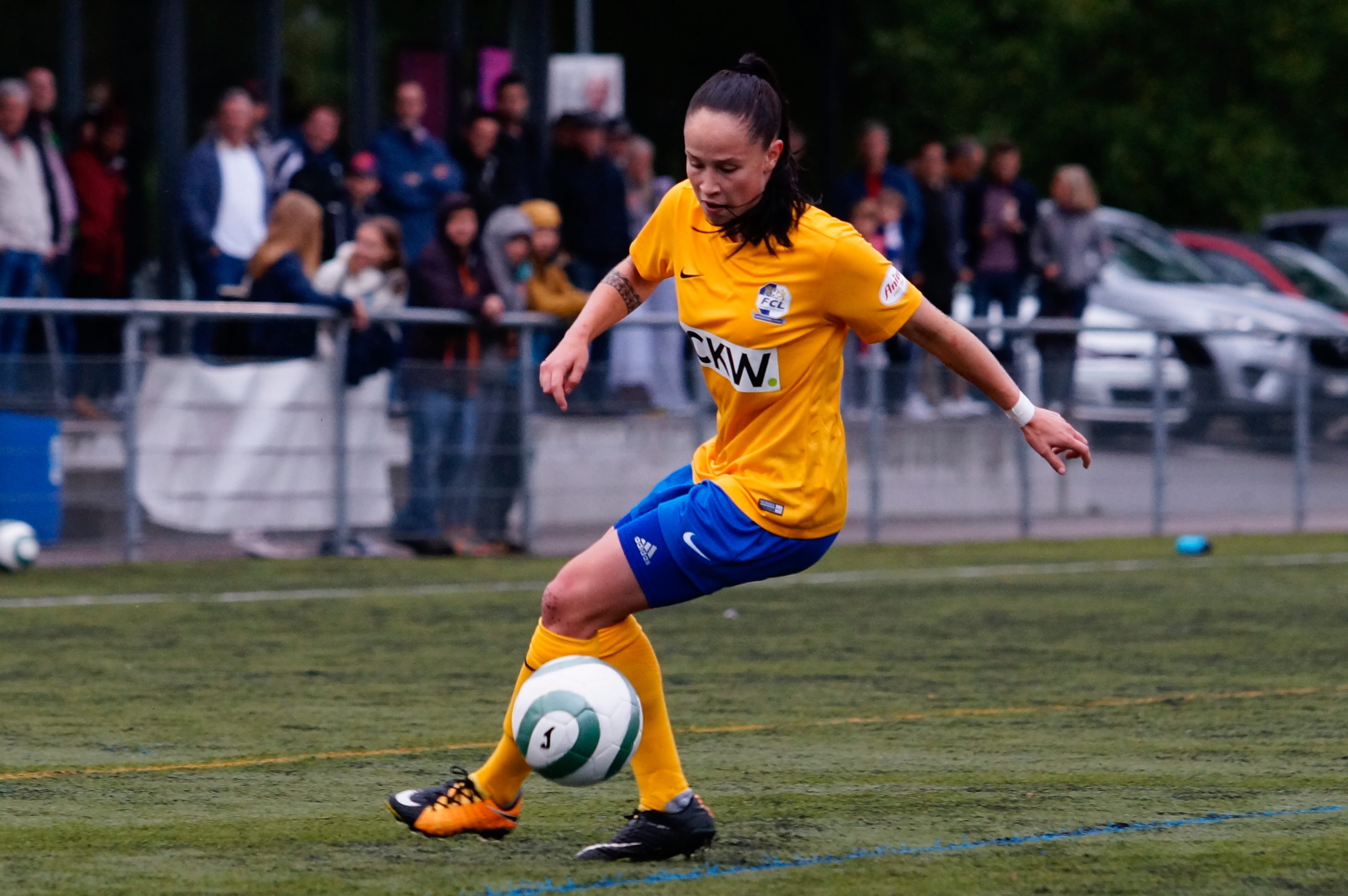 Géraldine Reuteler, Stürmerin beim FCL Spitzenfussball Frauen